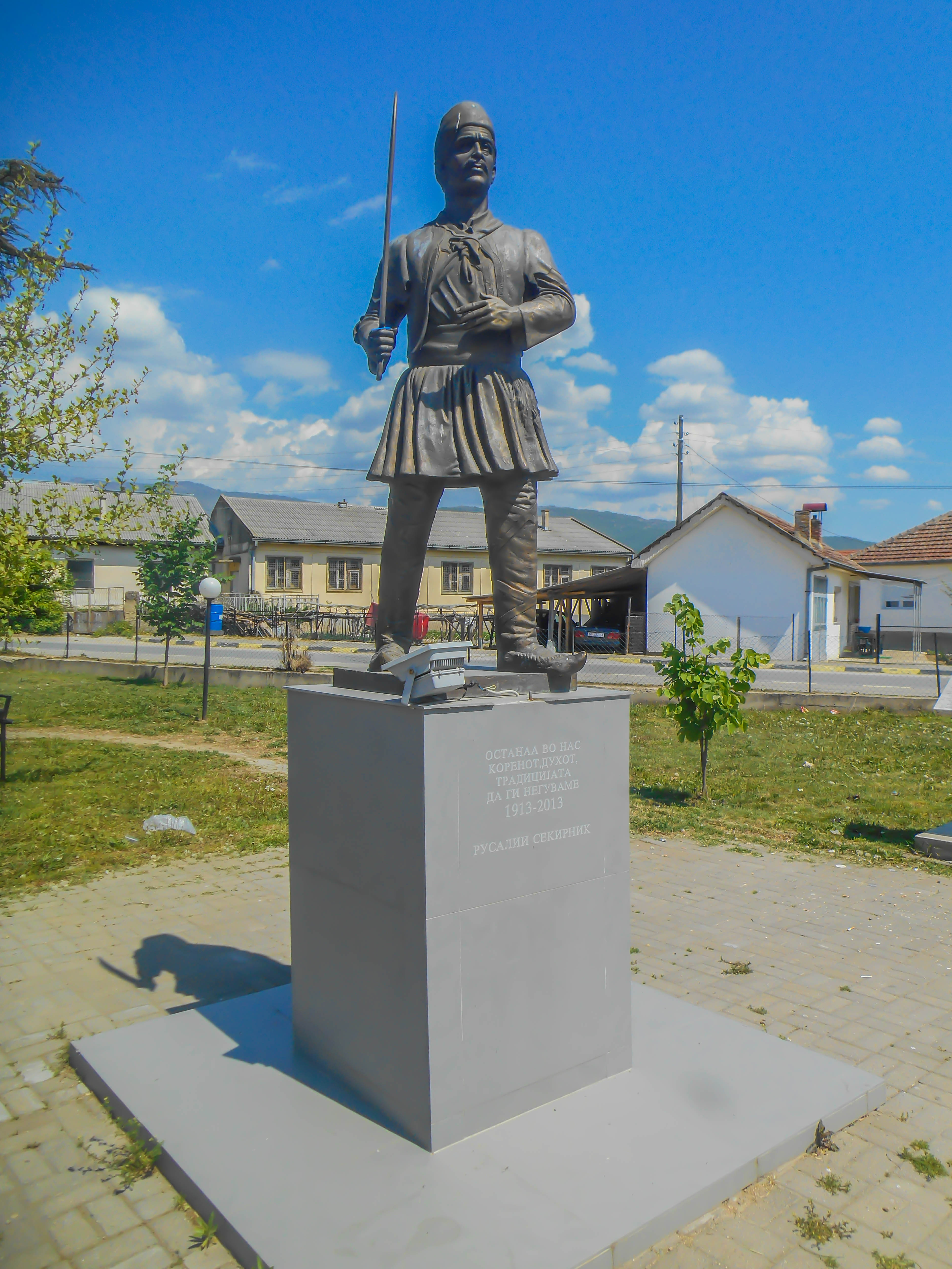 Споменик на Русалиите